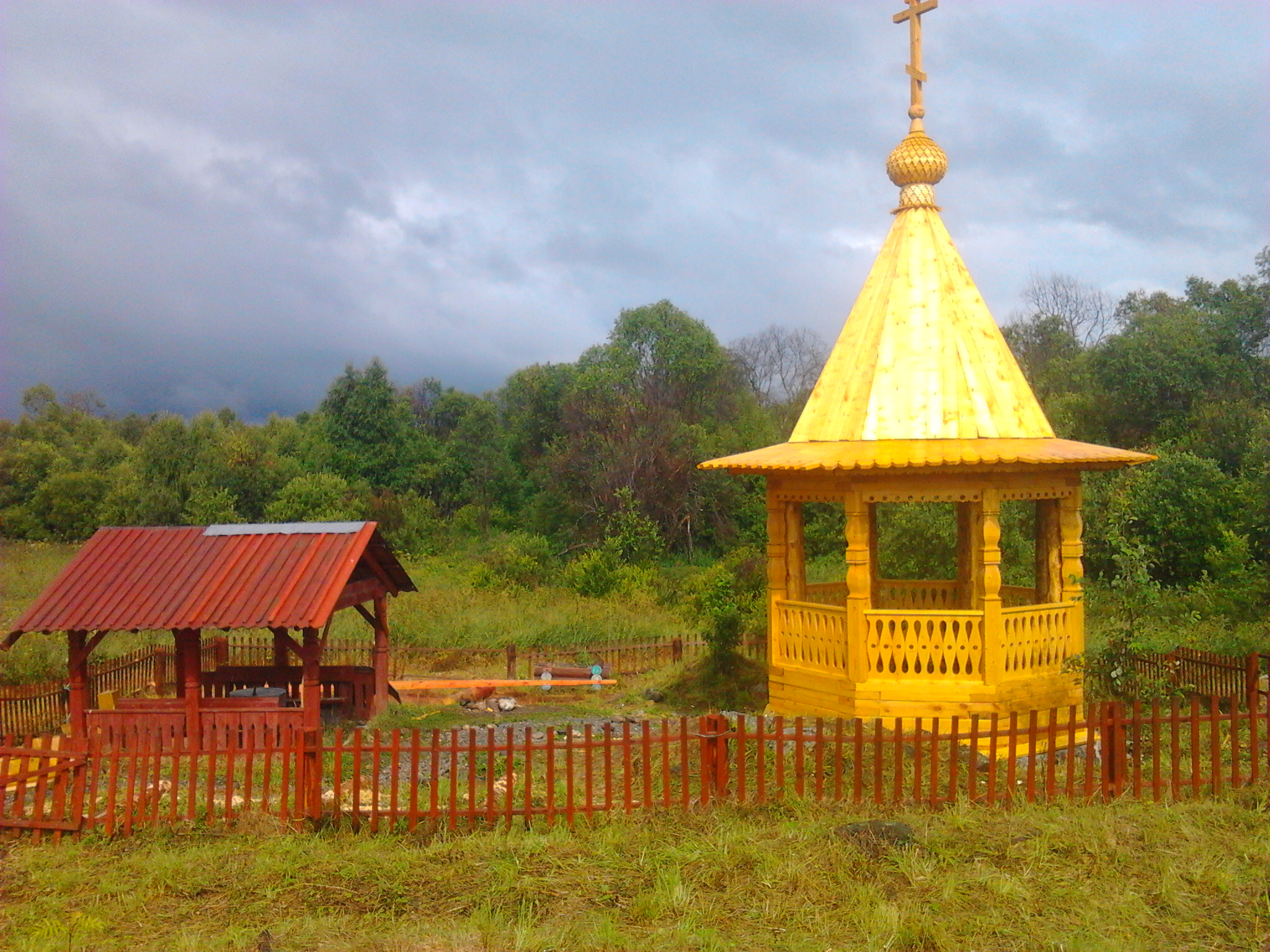 Святой источник воды "Царицын ключ"